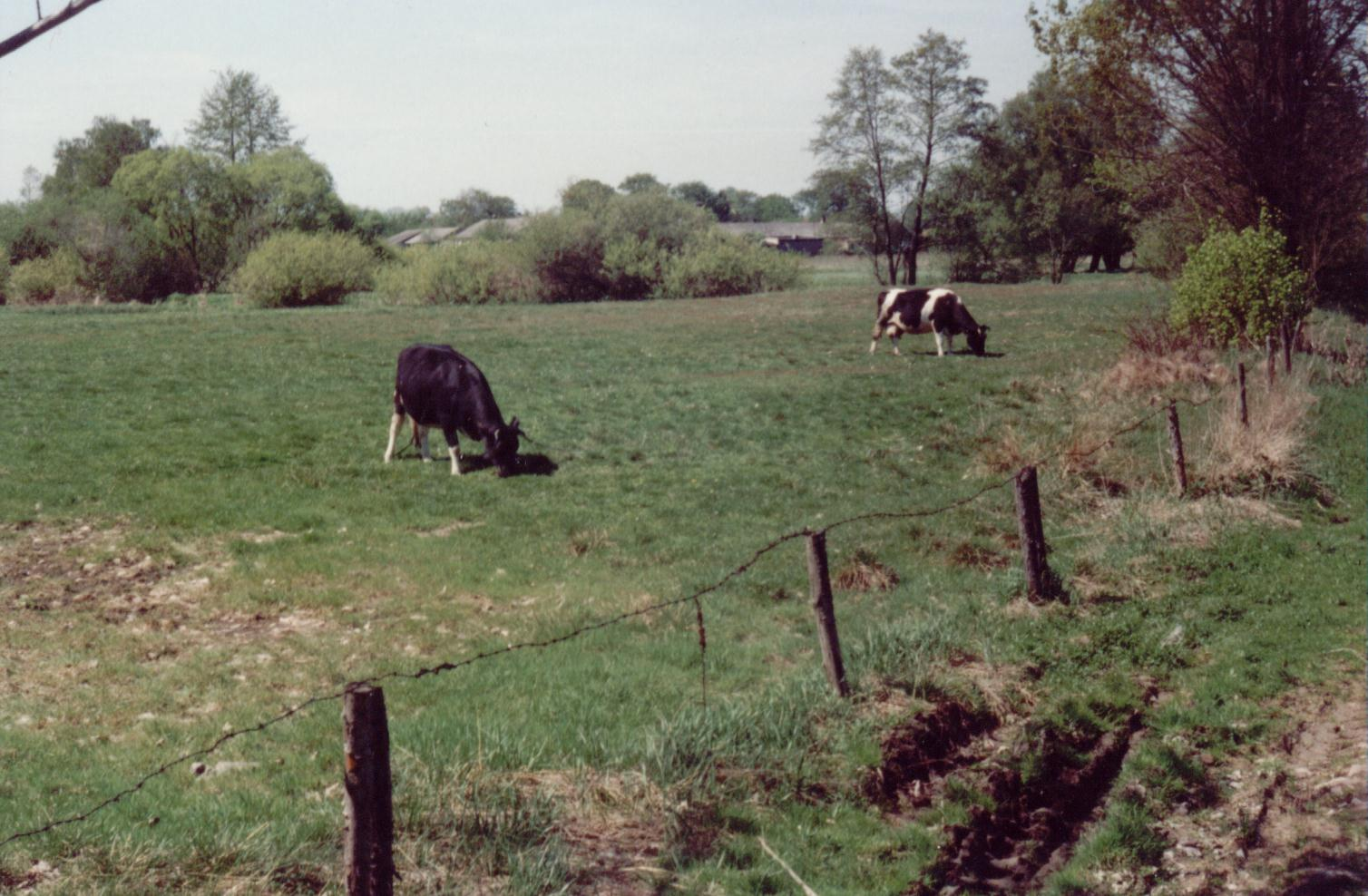 Łaki w pobliżu Nowego Dworu